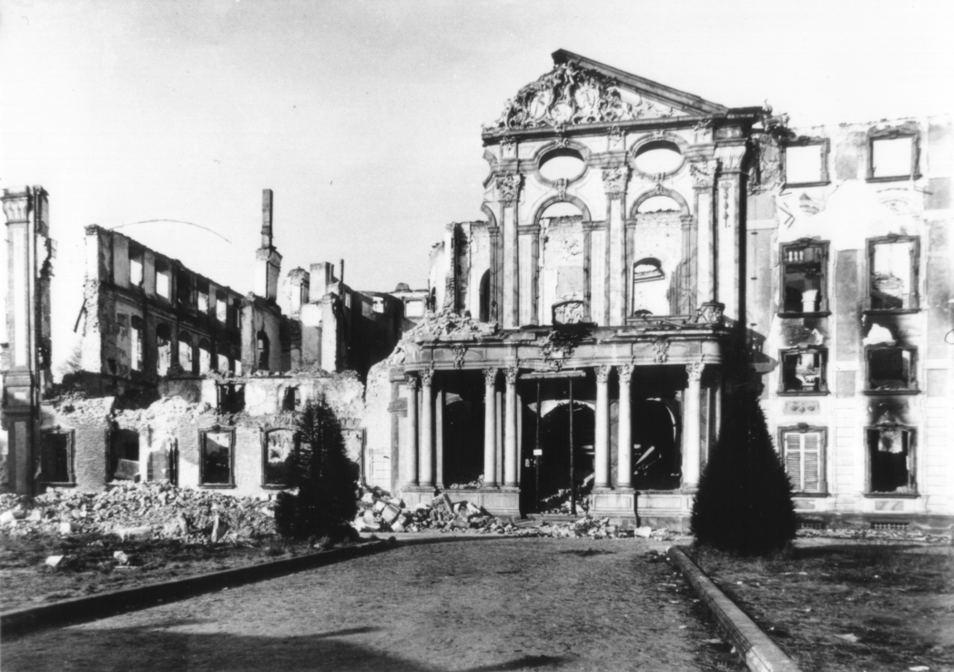 Schloss Bruchsal Corps de Logis 1945